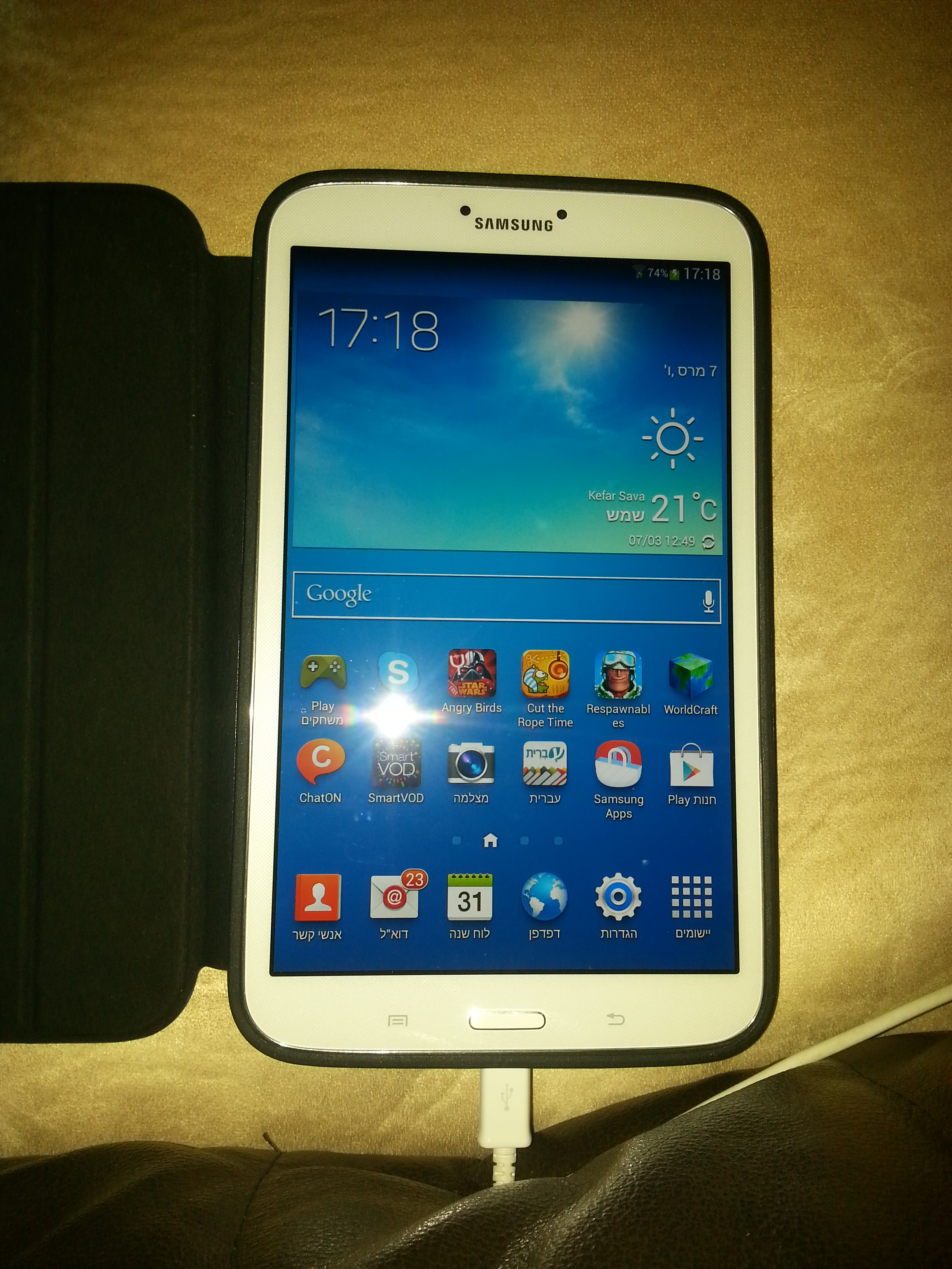 זה טאבלאט חדש של סמסונג